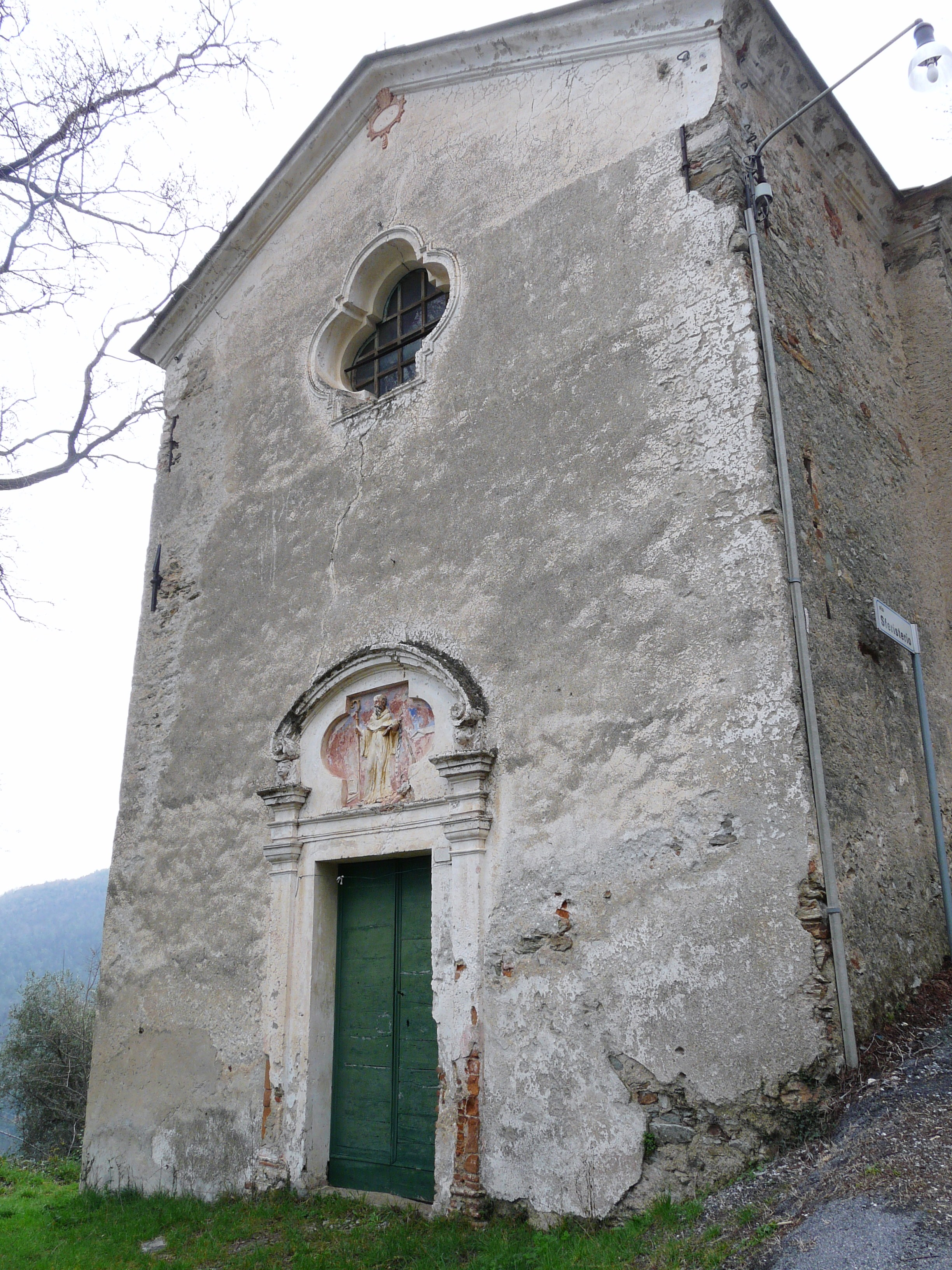 Oratorio di San Bernardo, Rialto, Liguria, Italia